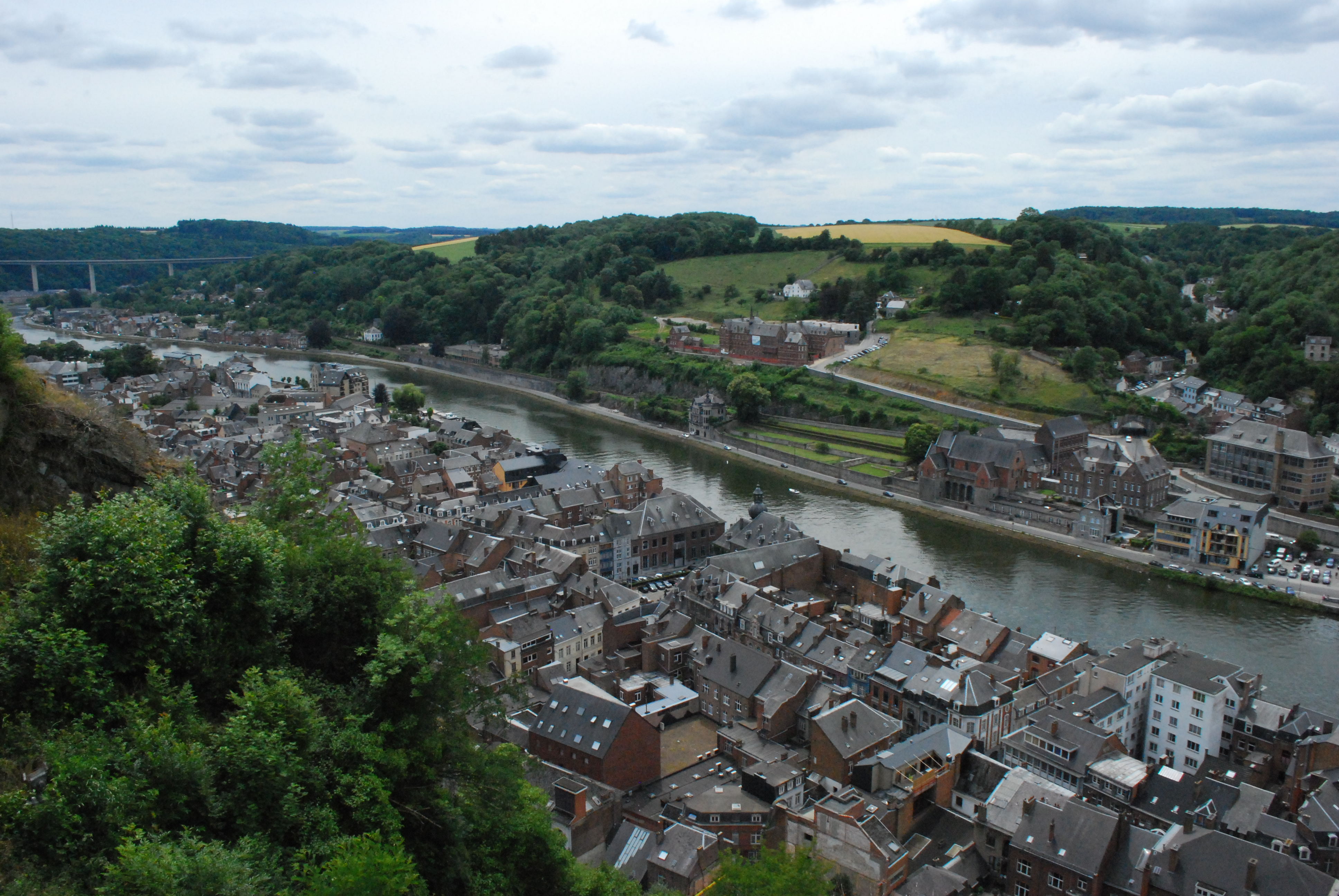 Vue sur Dinant, depuis la citadelle.